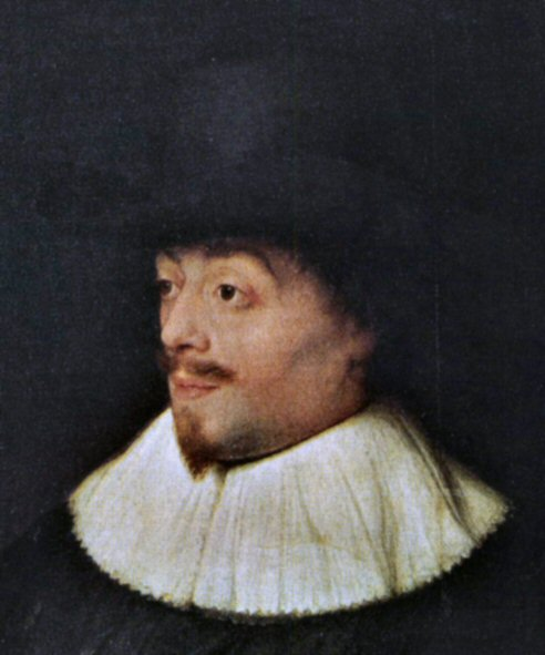 Constantijn Huygensdetail